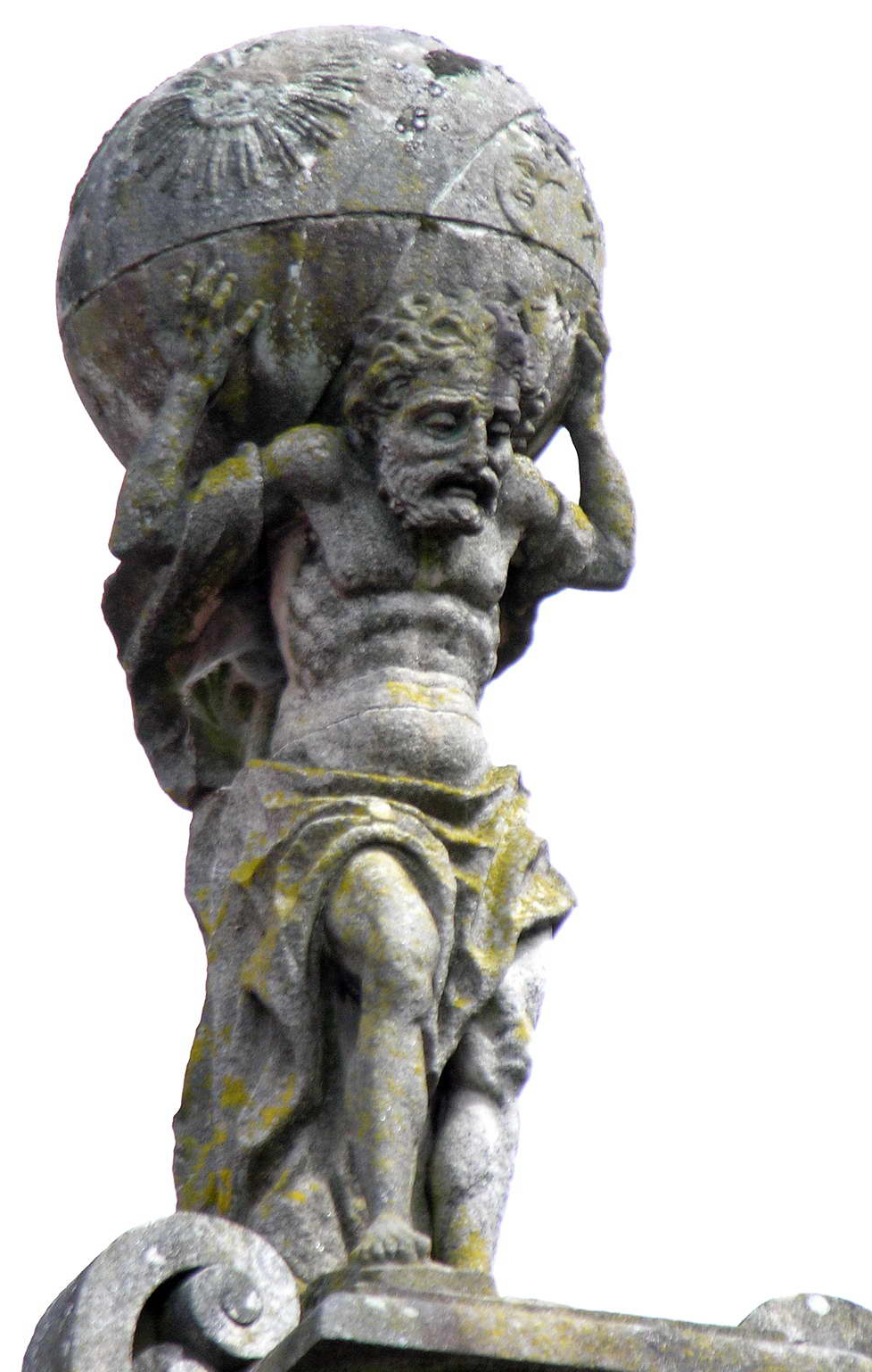 self made.